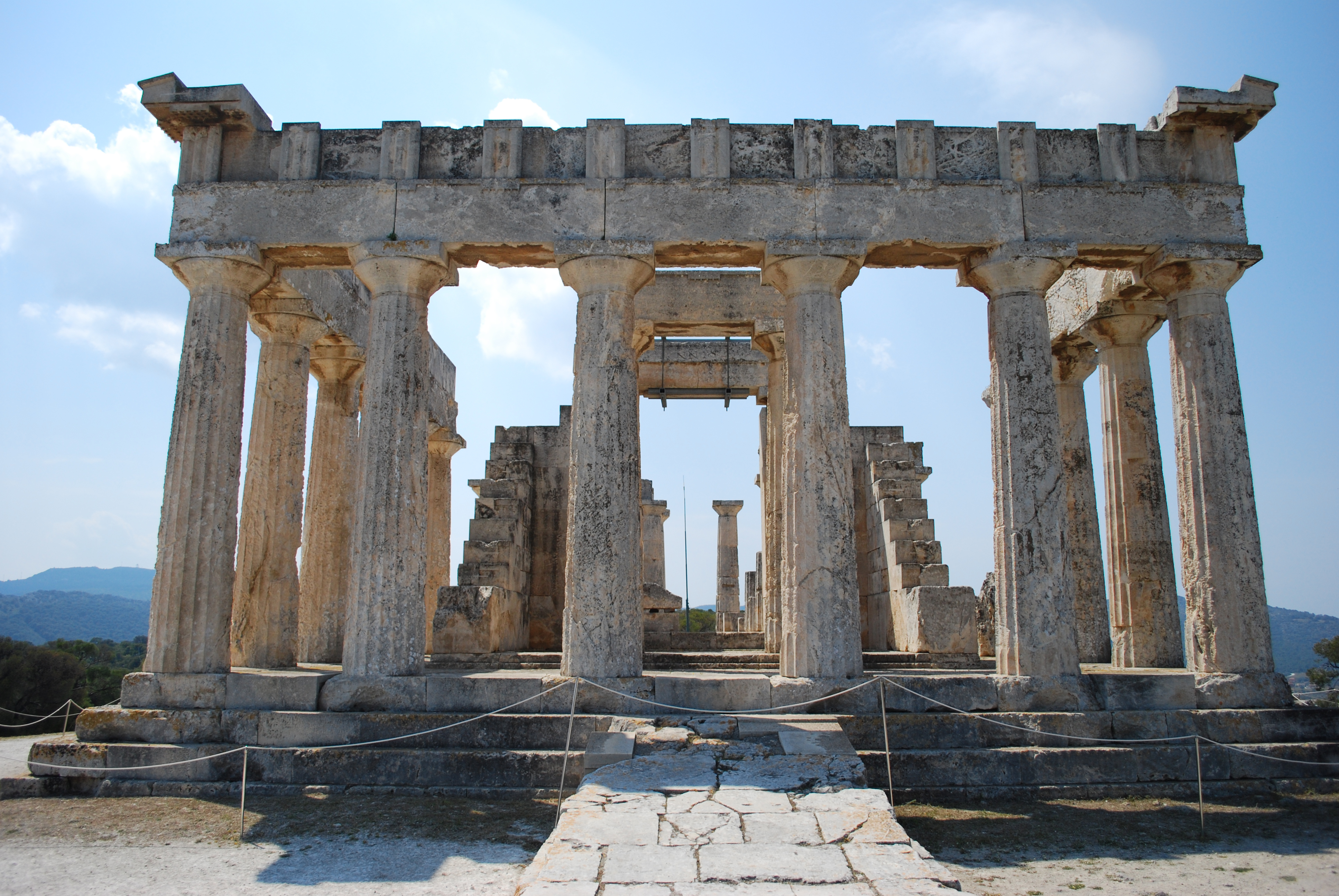 Vue du temple d'Aphaia à Egine.